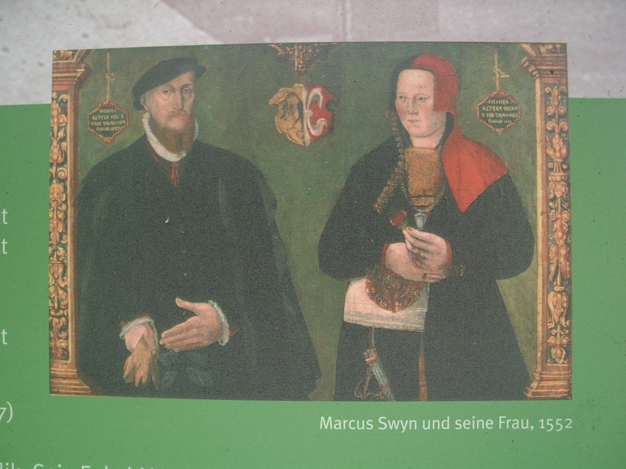 Geschlechterfriedhof Lunden